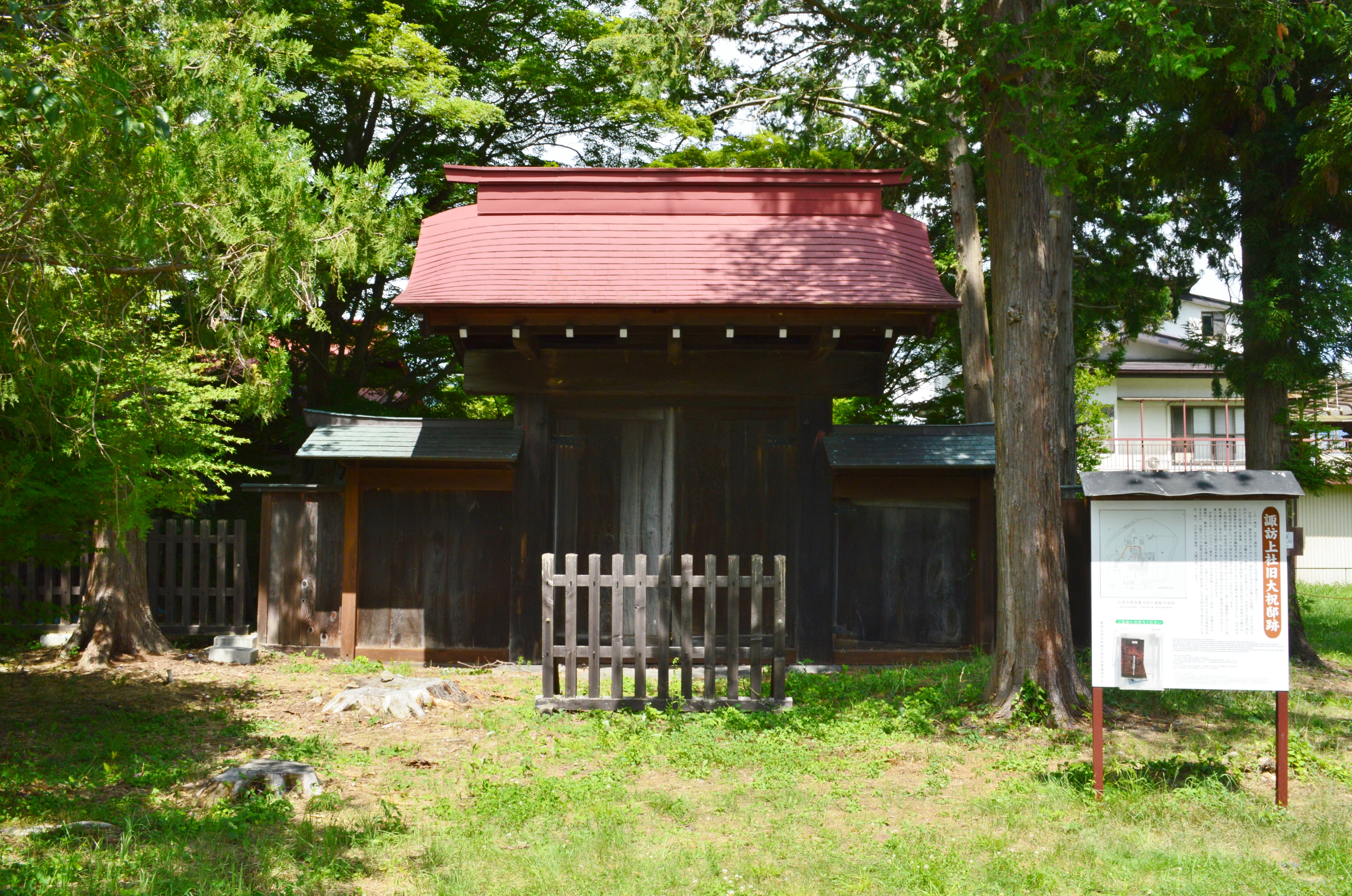 諏訪上社旧大祝邸跡 門